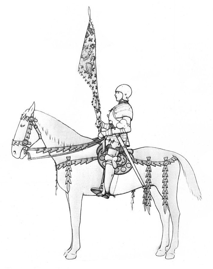 Jeanne d'Arc portant son étendard, essai de reconstitution d'Adrien Harmand dans Jeanne d'Arc : ses costumes, son armure : essai de reconstitution, Paris, imprimerie Aulard, librairie Ernest Leroux, 1929, p. 308.